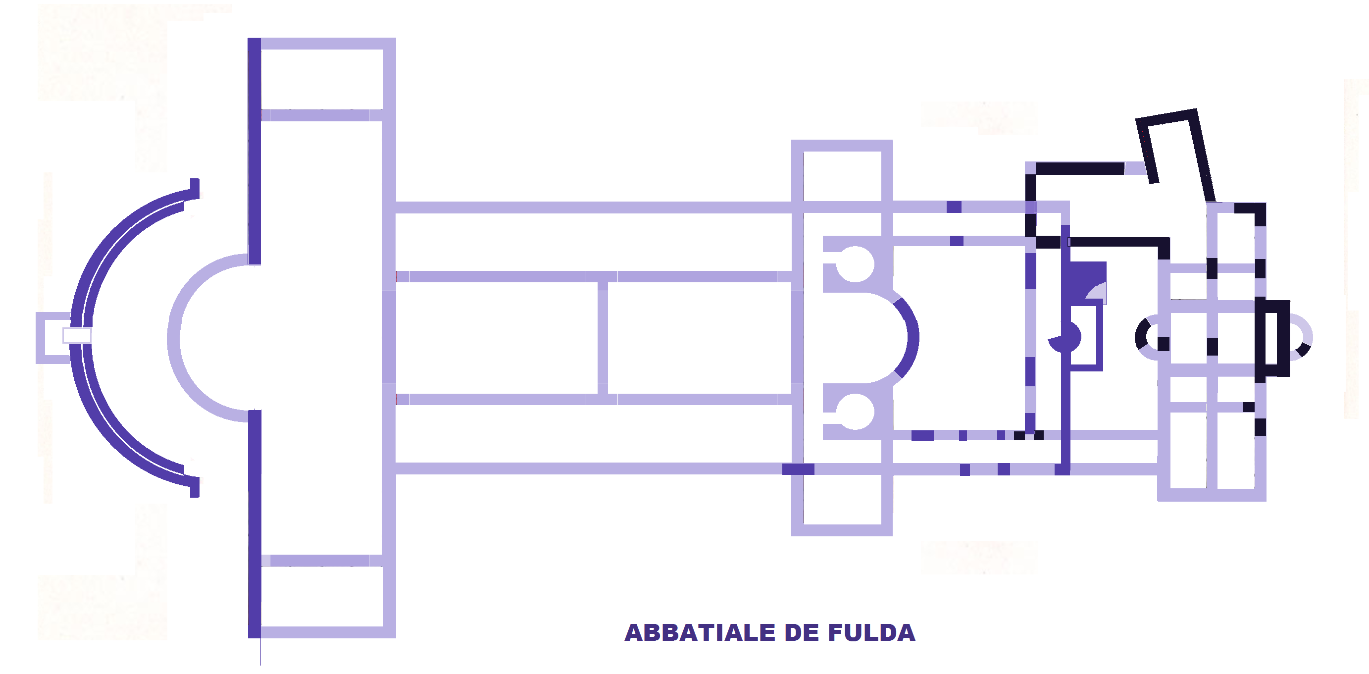 Abbatiale de Fulda, Plan